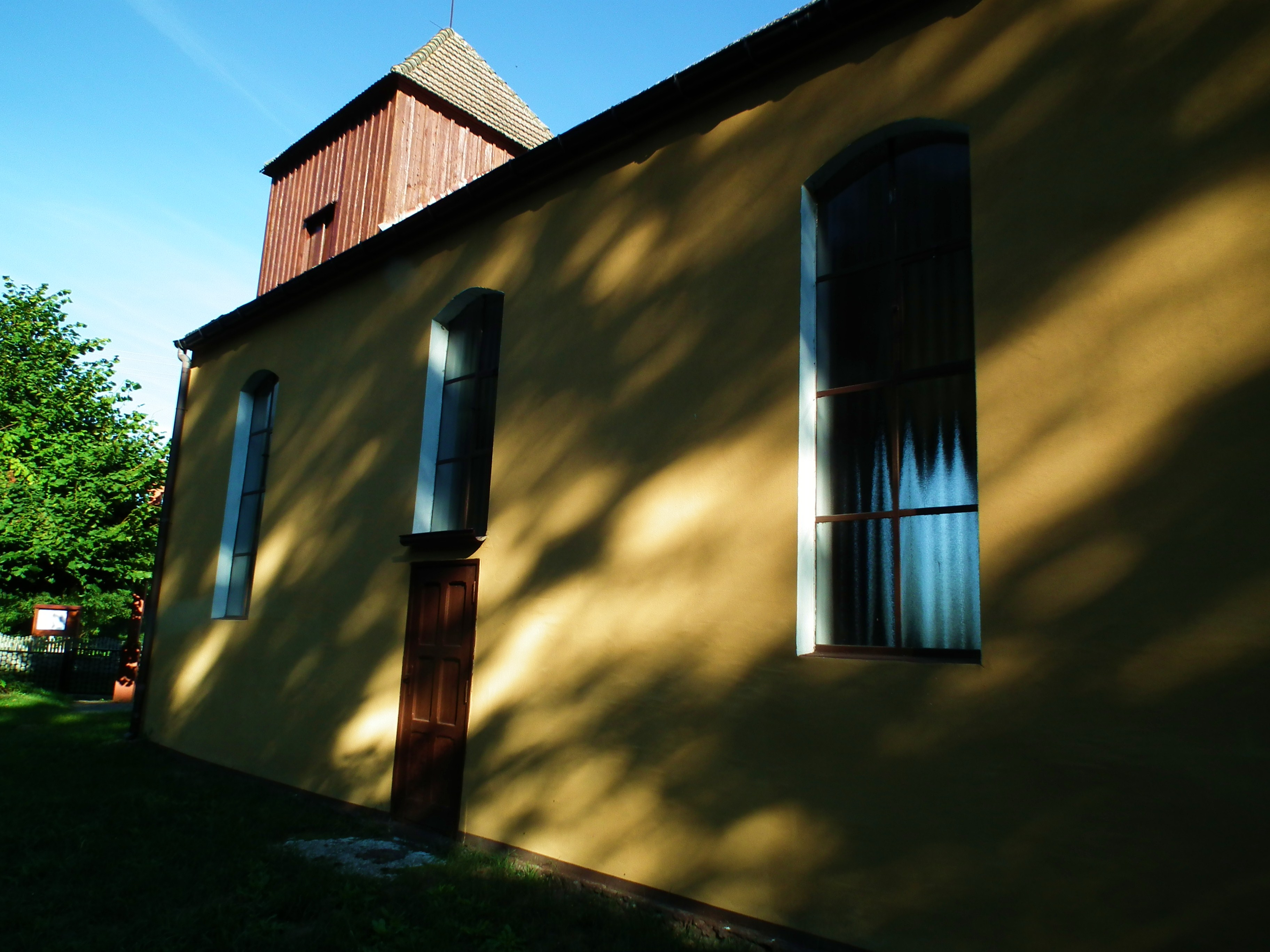 Kościół Niepokalanego Serca NMP w Studzionce.